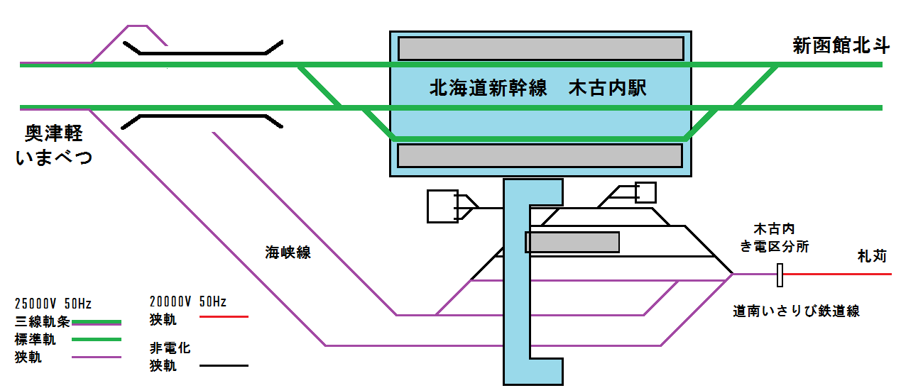 北海道新幹線開業後の木古内駅周辺の配線